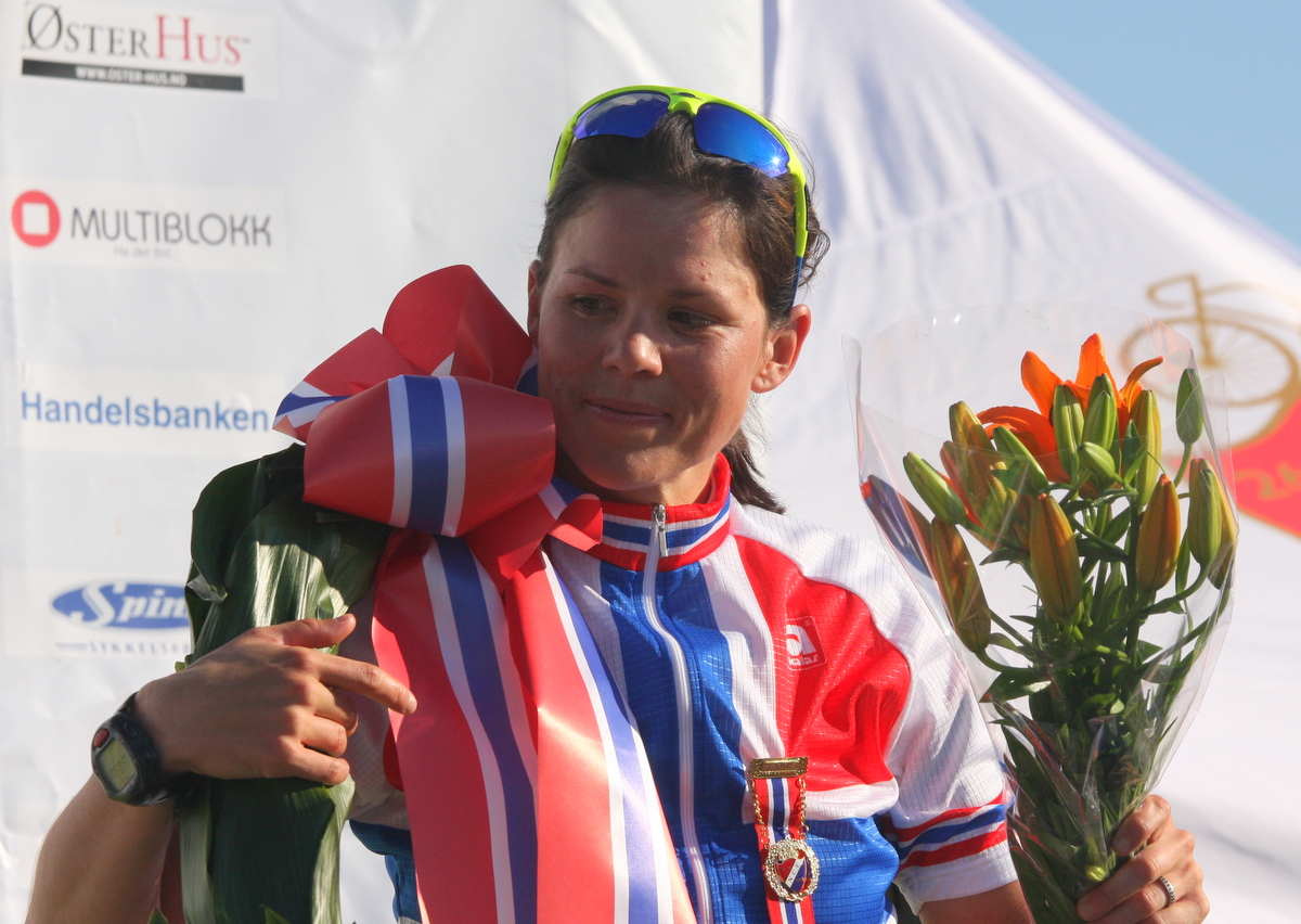 Linn Torp Eidsvoll , norsk syklist